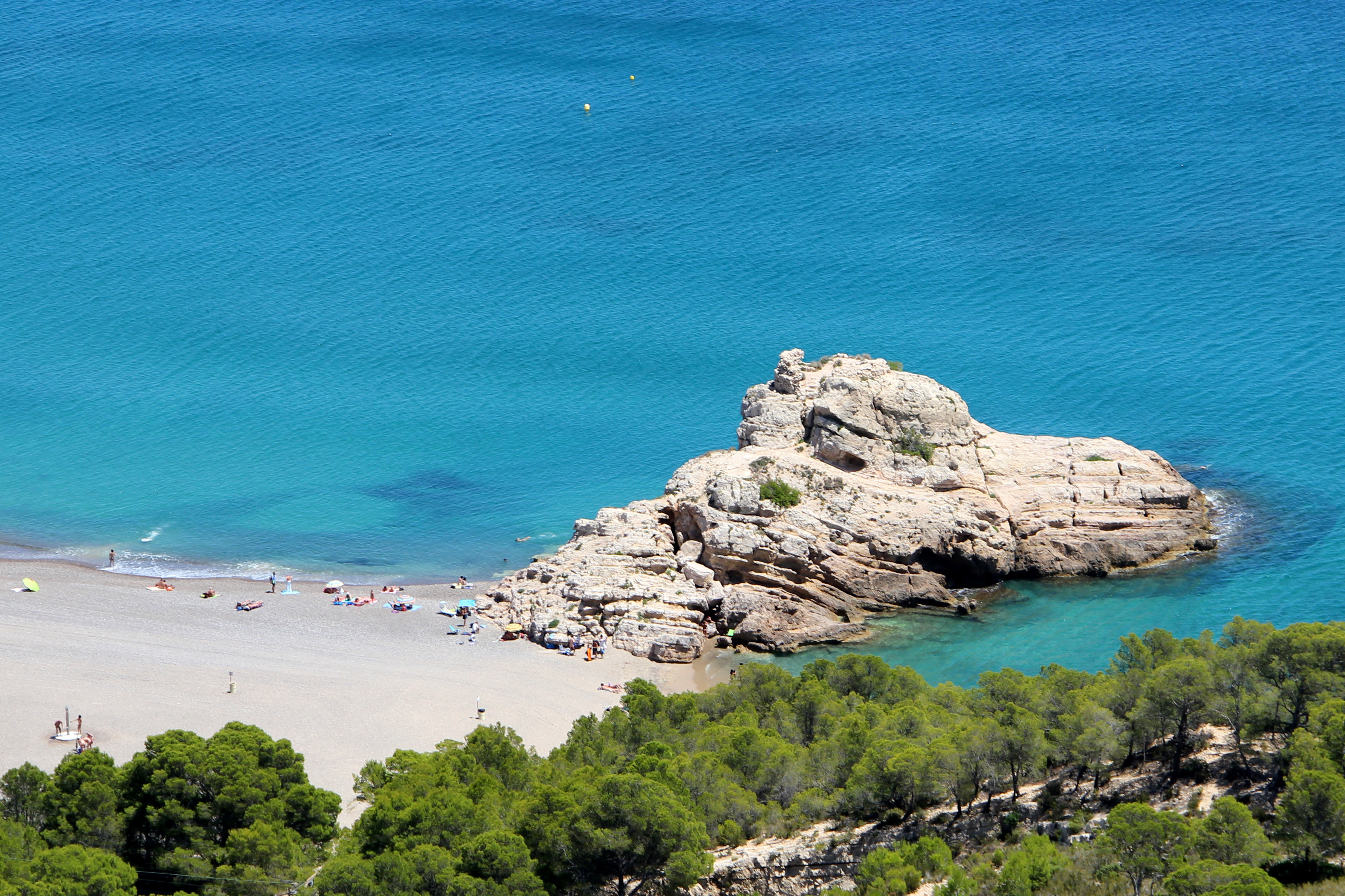 Illot del Torn, Vandellòs i l'Hospitalet de l'Infant